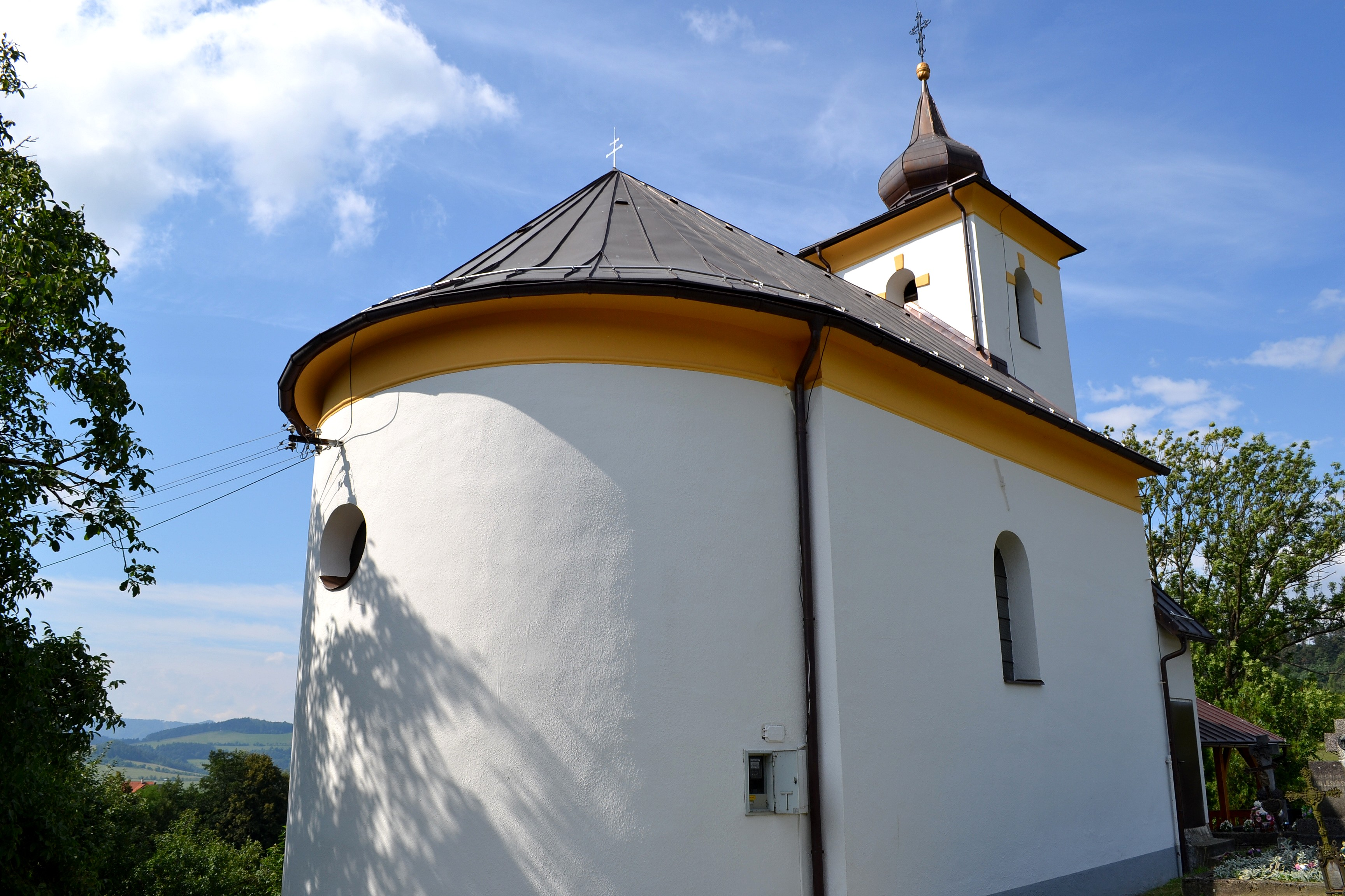 Horný Lieskov (okr. Považská Bystrica), Kostol svätého Kríža